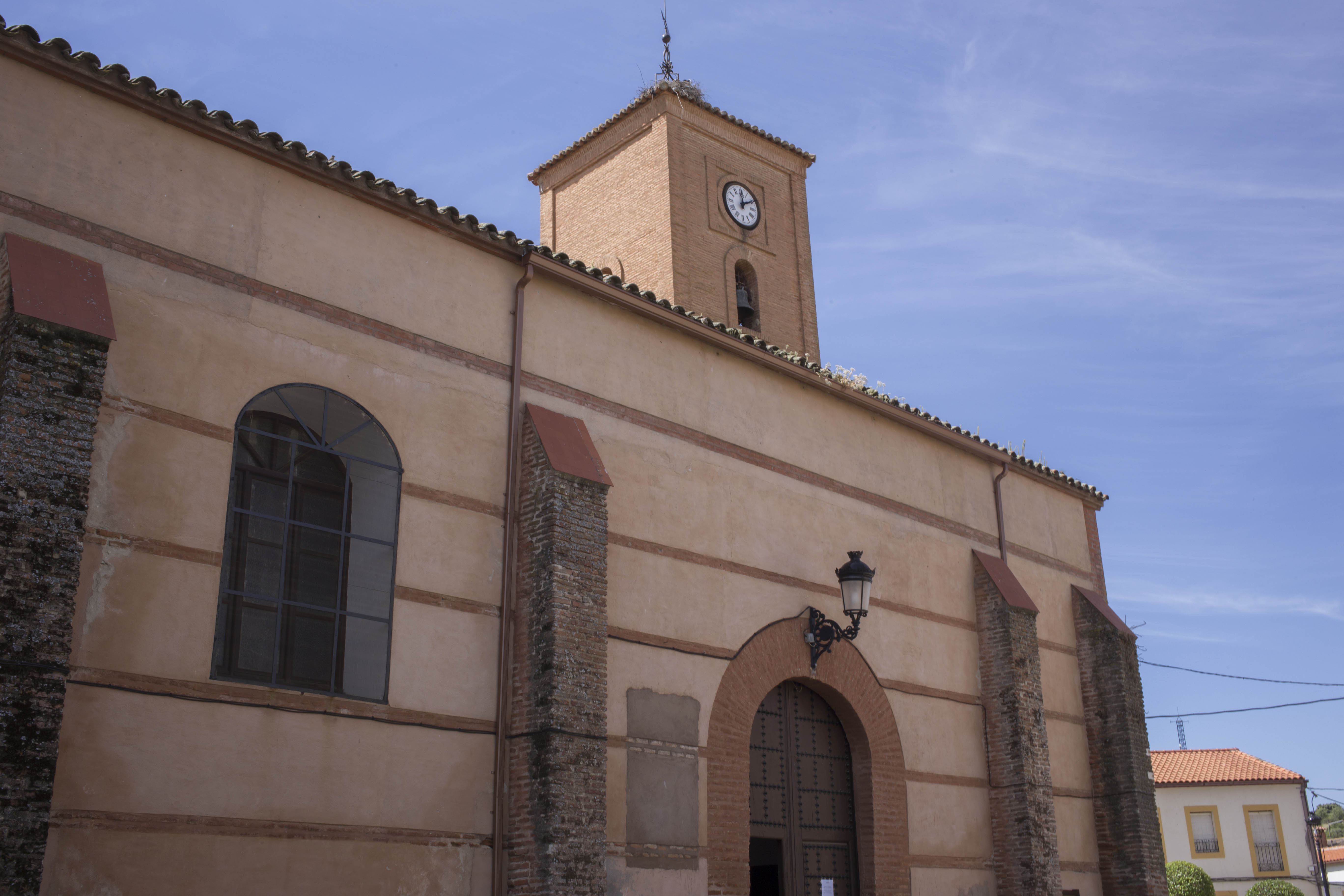 Espinoso del Rey